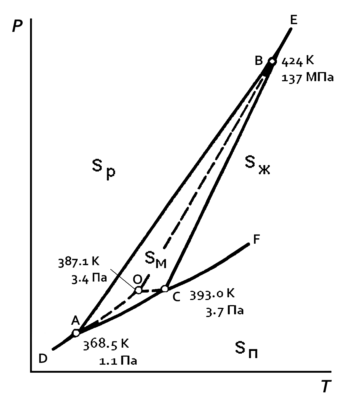 Фазовая диаграмма серы